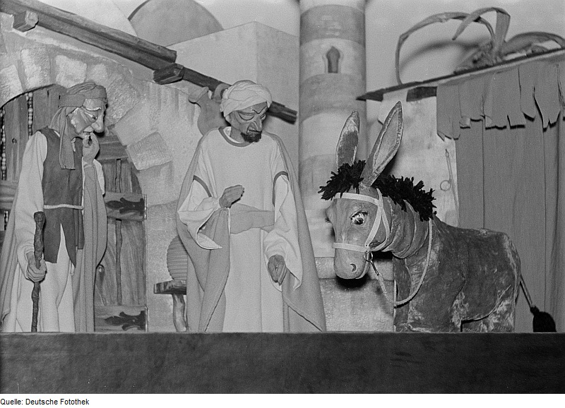 Original image description from the Deutsche Fotothek Szene aus der Aufführung einer Hodsha Nasreddin-Geschichte